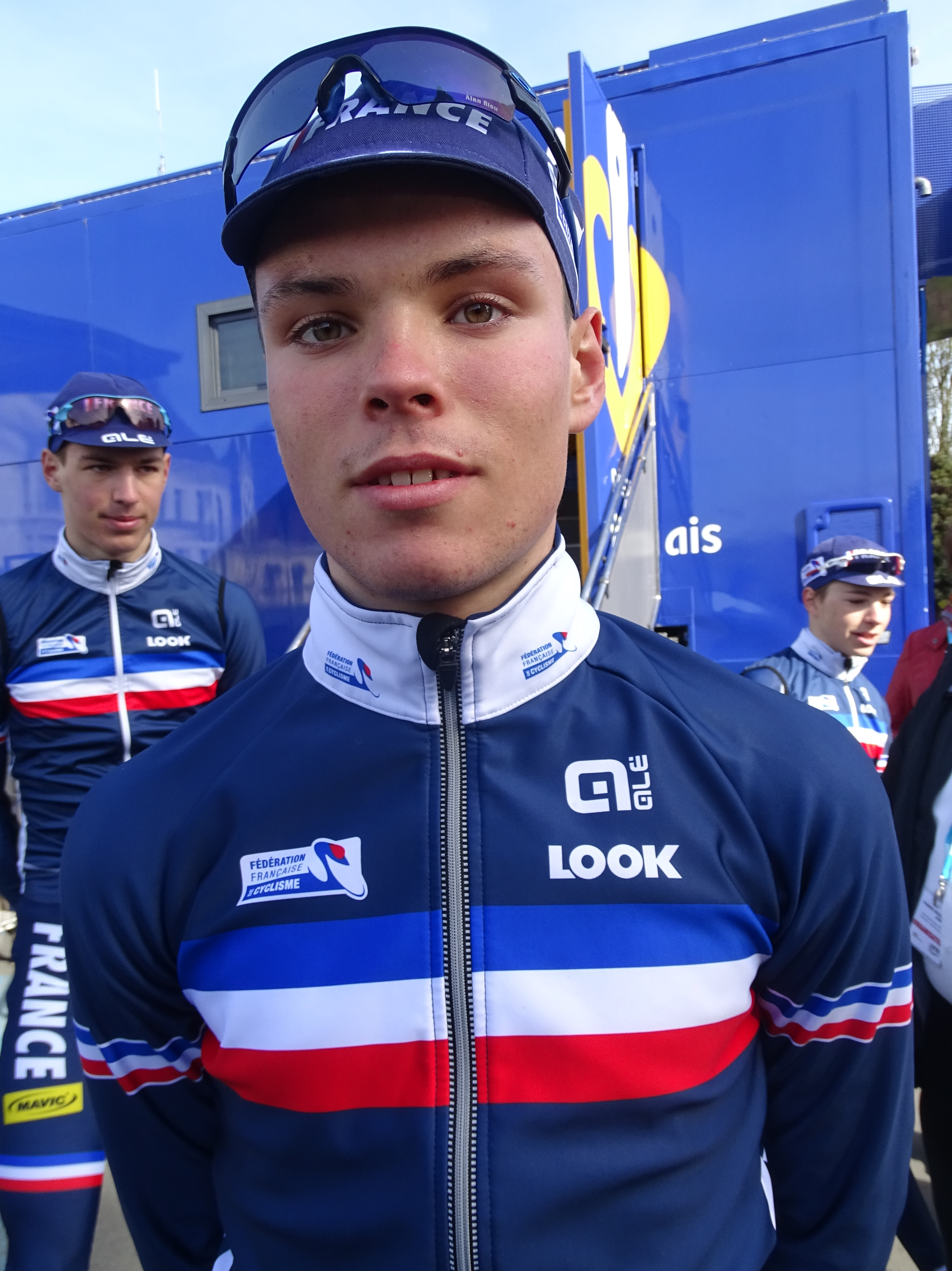 Reportage réalisé le dimanche 12 avril à l'occasion du départ du Paris-Roubaix juniors 2015 à Saint-Amand-les-Eaux, France.